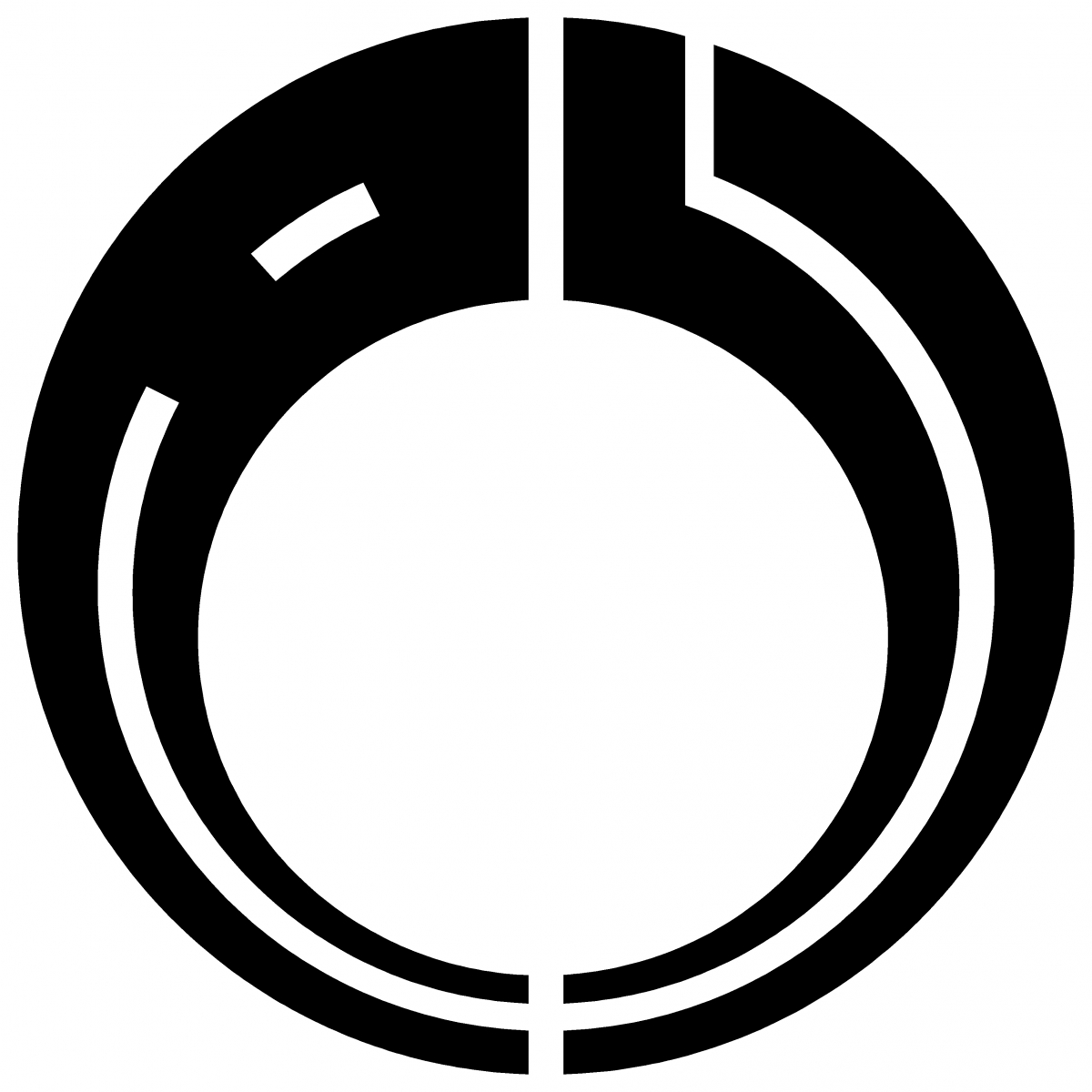 Seal of the Ministry of Foreign AffairsThe Ministry of Foreign Affairs says "1937年（昭和12年）、外務省では「外」の字をくずしたデザインの銀製バッジを作成して全省員に配布し、常に身に付けるよう励行しました". It says "バッジのデザインとなった「外」の字の紋章は、もともとは歴代外務大臣が使用していた硯箱の蓋に描かれていたもので、現在も外務省の標章として、外務省庁舎正門や外務省員の身分証明書などに使用されています".